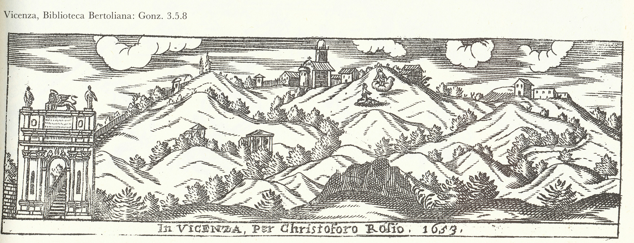 Incisione di Cristoforo Rosio, 1653, pubblicata con il testo di F. Barbarano, Historia ecclesiastica della città ...